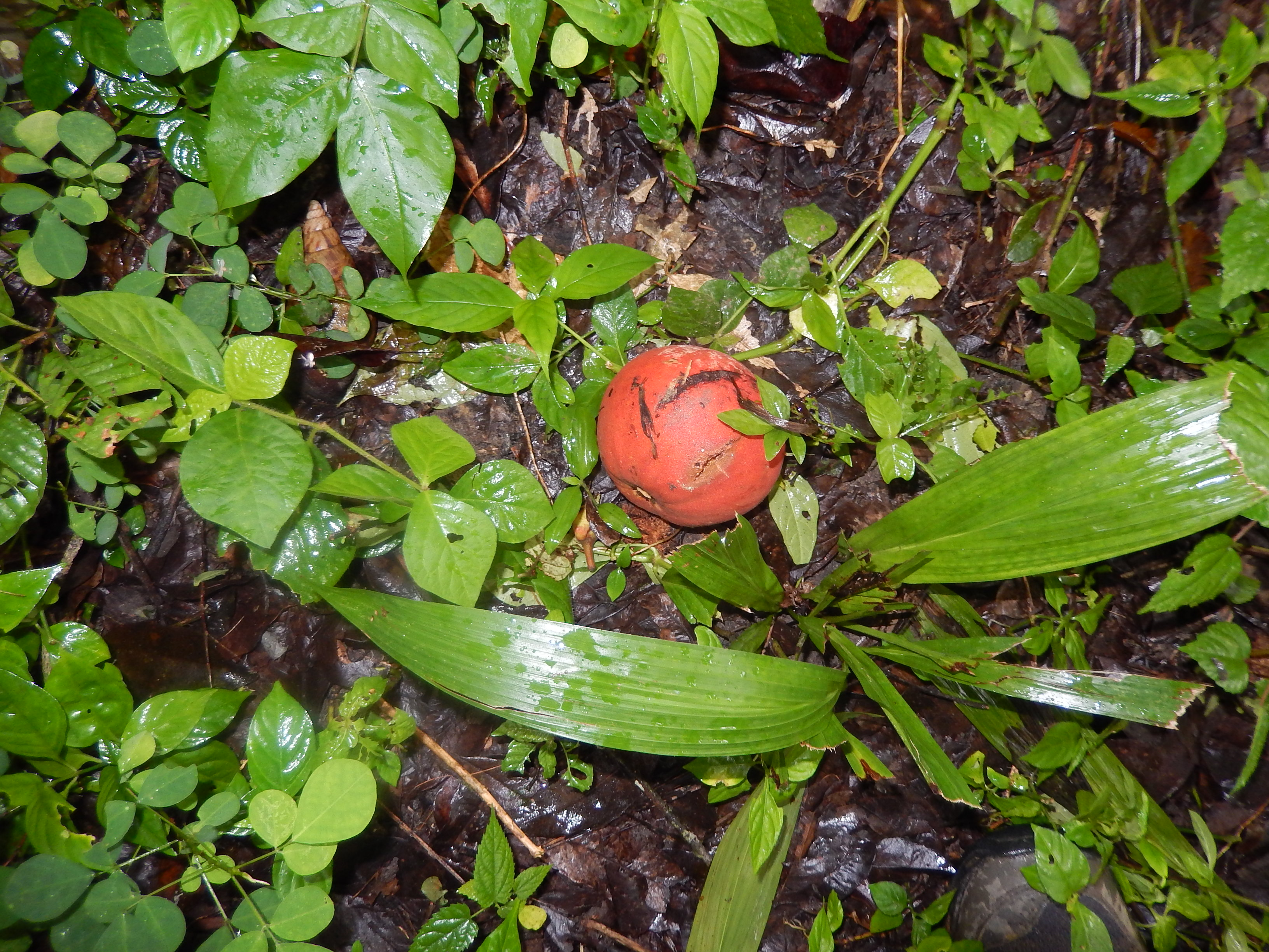 Garcinia kola (Tayap, Cameroun)